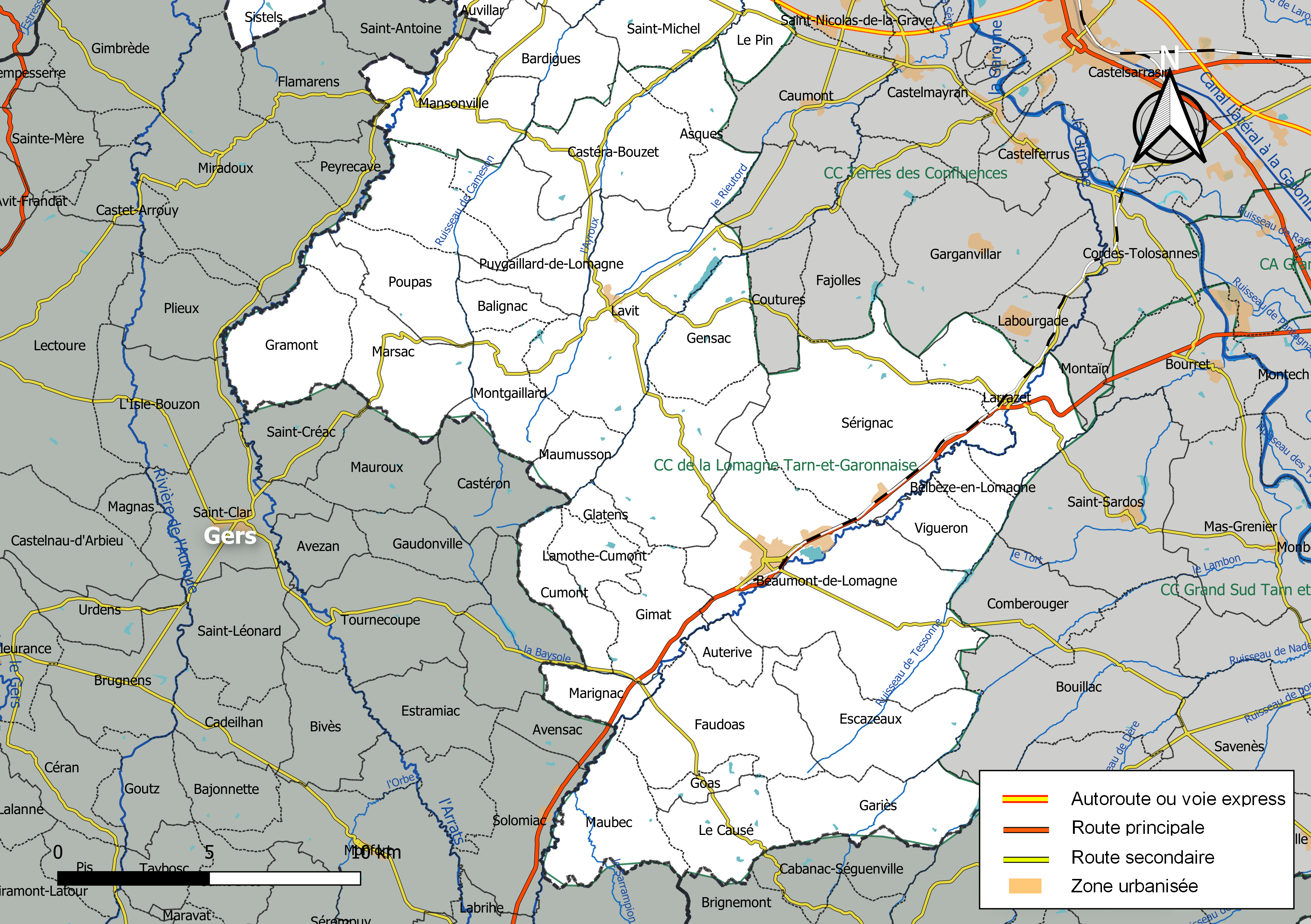 Carte géographique de la Communauté de communes de la Lomagne tarn-et-garonnaise, département de Tarn-et-Garonne, France. Composition au 1er janvier 2019.